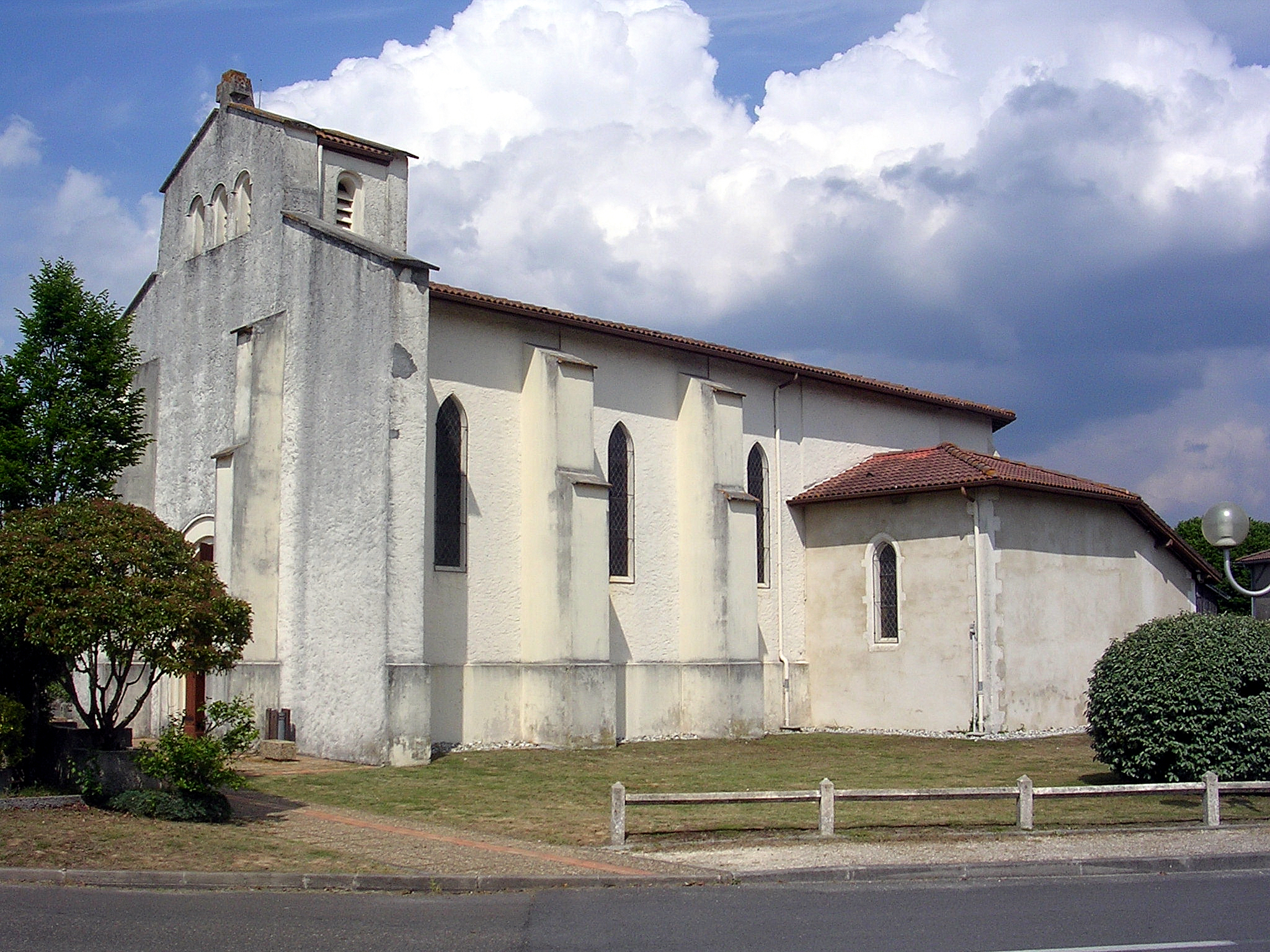 Église Sainte-Eulalie, à Sainte-Eulalie-en-Born, dans le département français des Landes